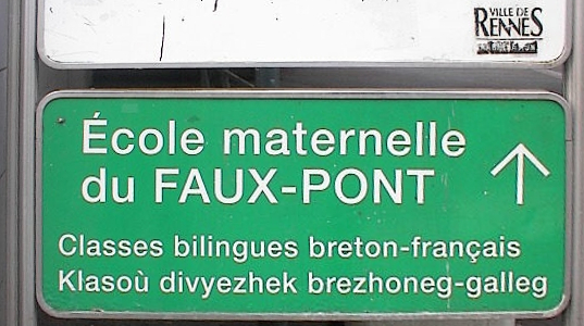 école bilingue en breton/français à Rennes, Bretagne bilingual school sign Breton/French in Rennes, Brittany Photo taken by Man vyi on 18/8/2002